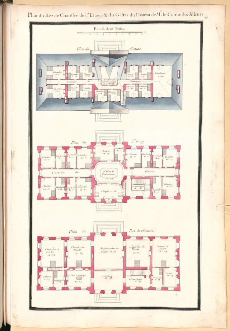 Plan du rez-de-chaussée et des étages du château de Chèreperrine construit en 1704 par l'architecte parisien Delamair pour M. et Mme des Alleurs